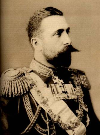 Alexander van Bulgarije (Verona, 25 april 1857 – Graz, 17 november 1893)